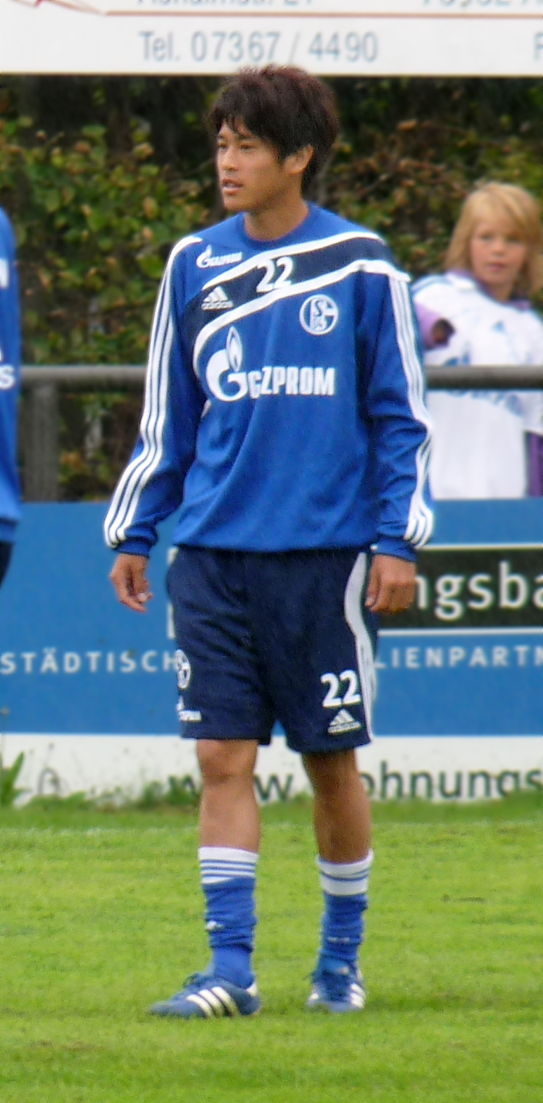 Atsuto Uchida